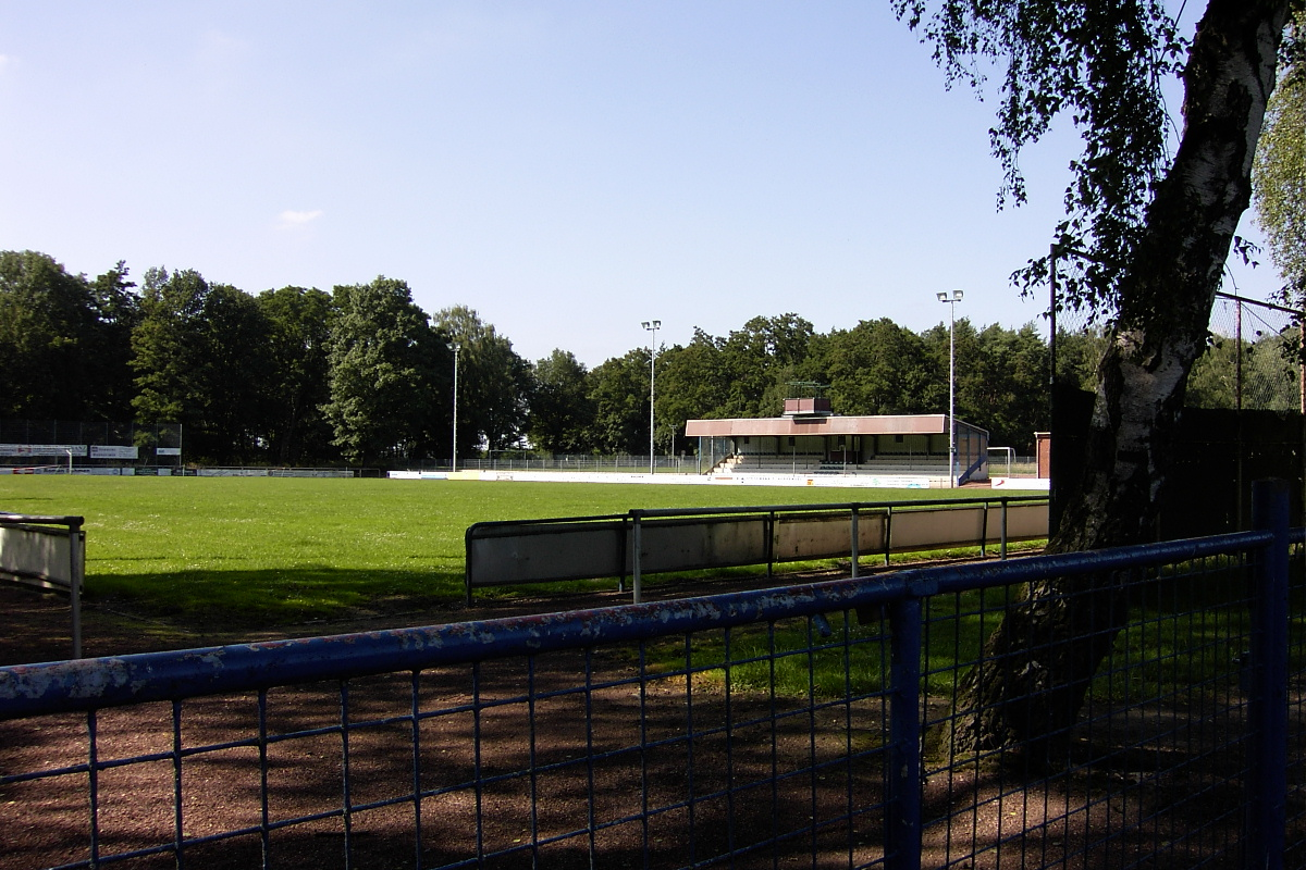 Heidestadion des Vereins Germania Teveren in Teveren